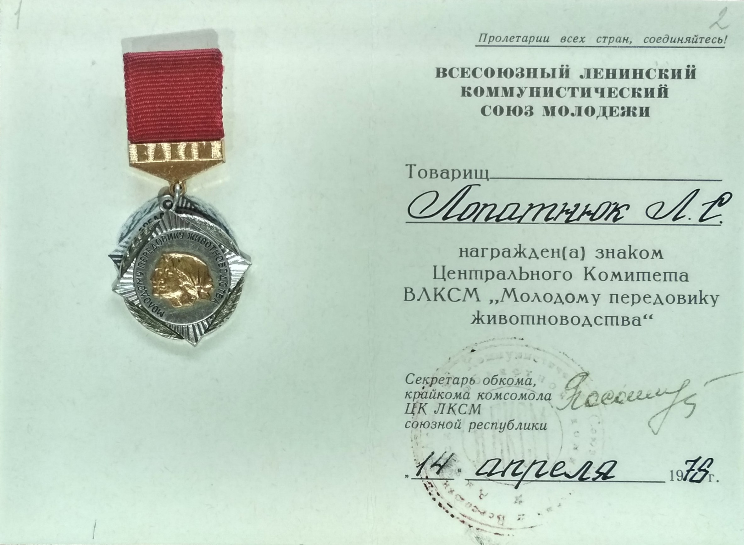 Знак ЦК ВЛКСМ «Молодому передовику животноводства» и удостоверение к нему. Экспозиция Благовещенского краеведческого музея